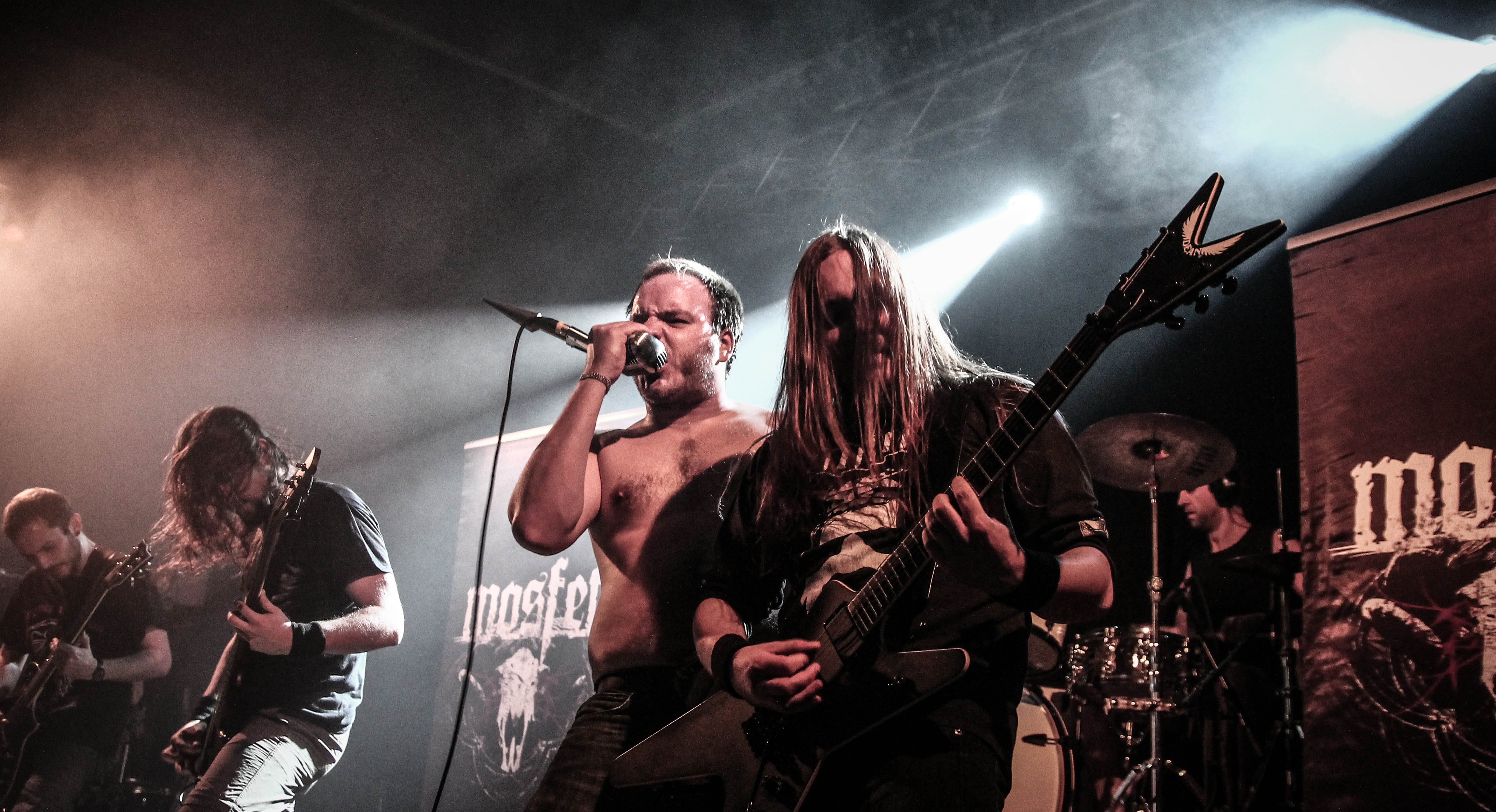 Mosfet Live 2014